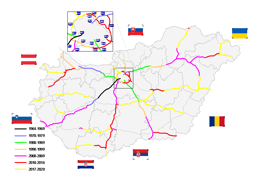 A magyar autópályahálózat fejlődése 1964-2020 között